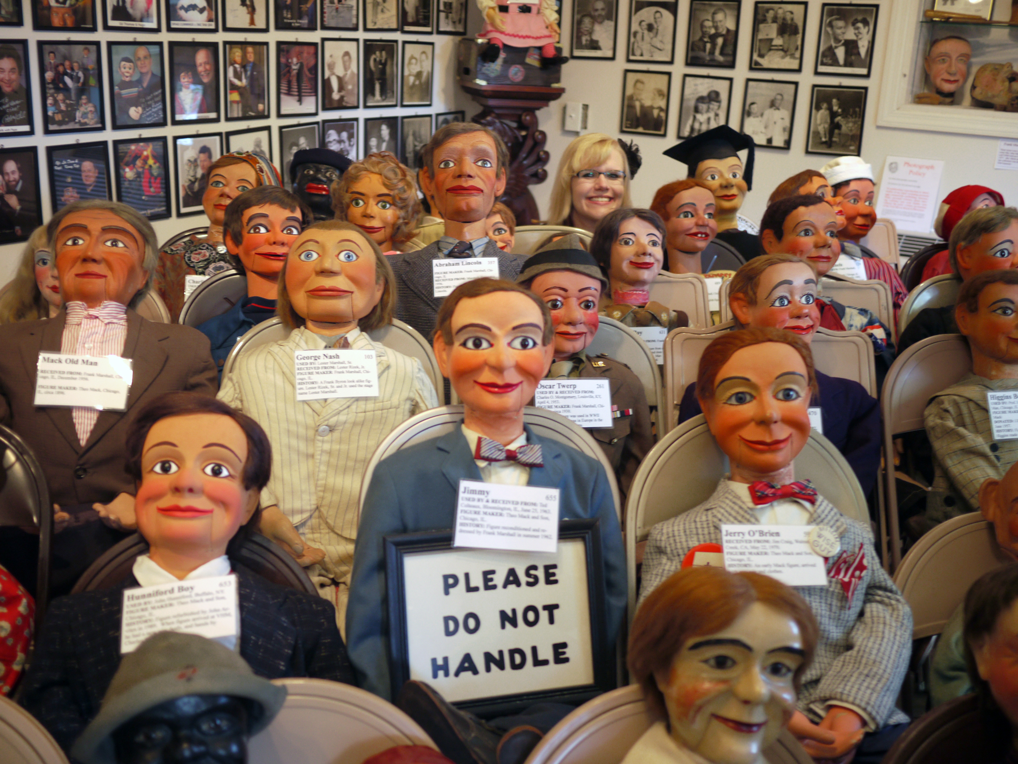 Vent Haven Museum